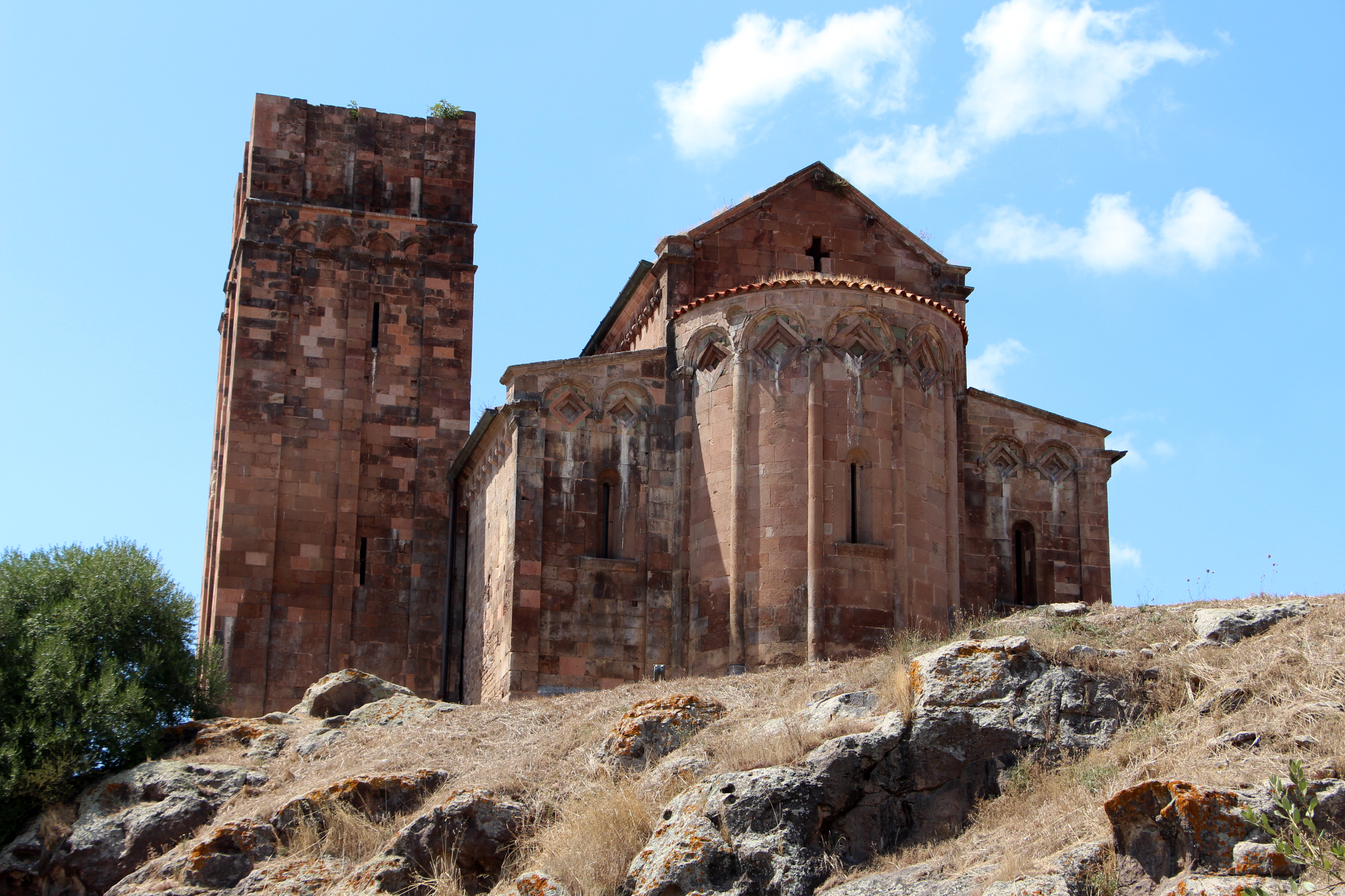 Sant'Antioco di Bisarcio (Ozieri)